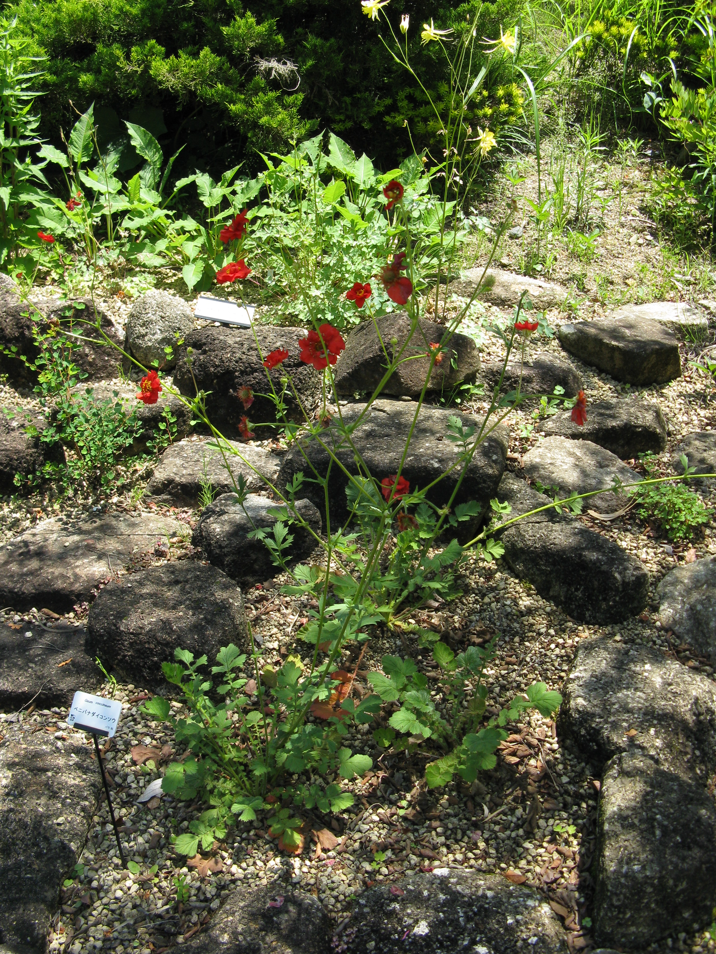 Geum coccineum